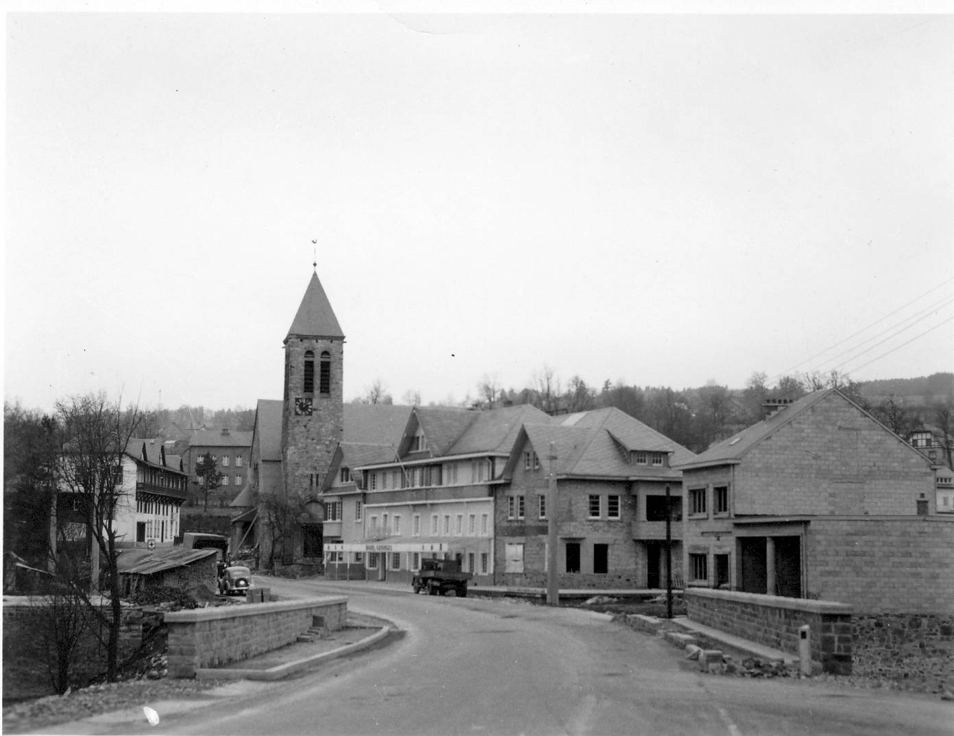 Pont de Ligneuville en 1952, vue vers l'église